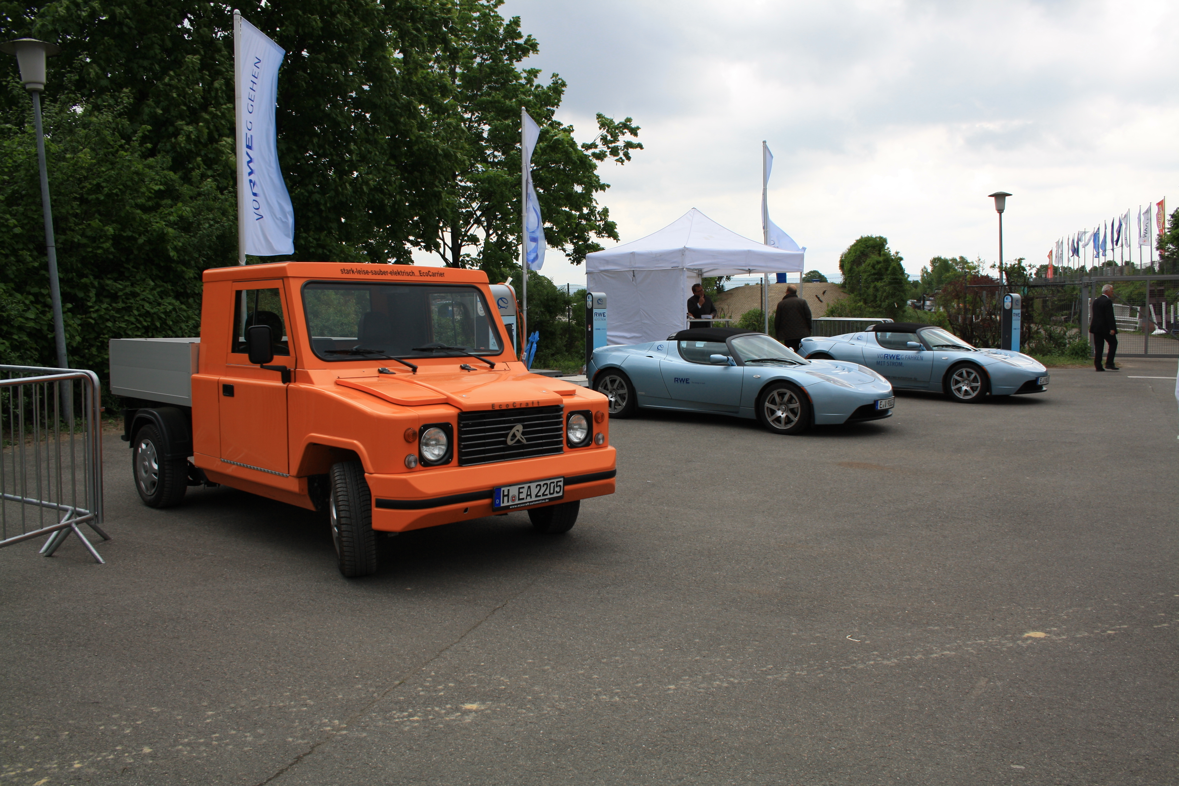 Der Eco Carrier ES von Ecocraft ist ein deutsches Elektroauto mit einer Ladekapazität von zwei Europaletten auf der Pritsche. Die Aufnahme entstand am Rande des Mannheimer Maimarkt 2010. Mit dem Ecocraft konnte ich eine Probefahrt machen. Nach einer Fahrt mit einen City EL die zweite Probefahrt mit einem E-Auto im öffentlichen Straßenverkehr.